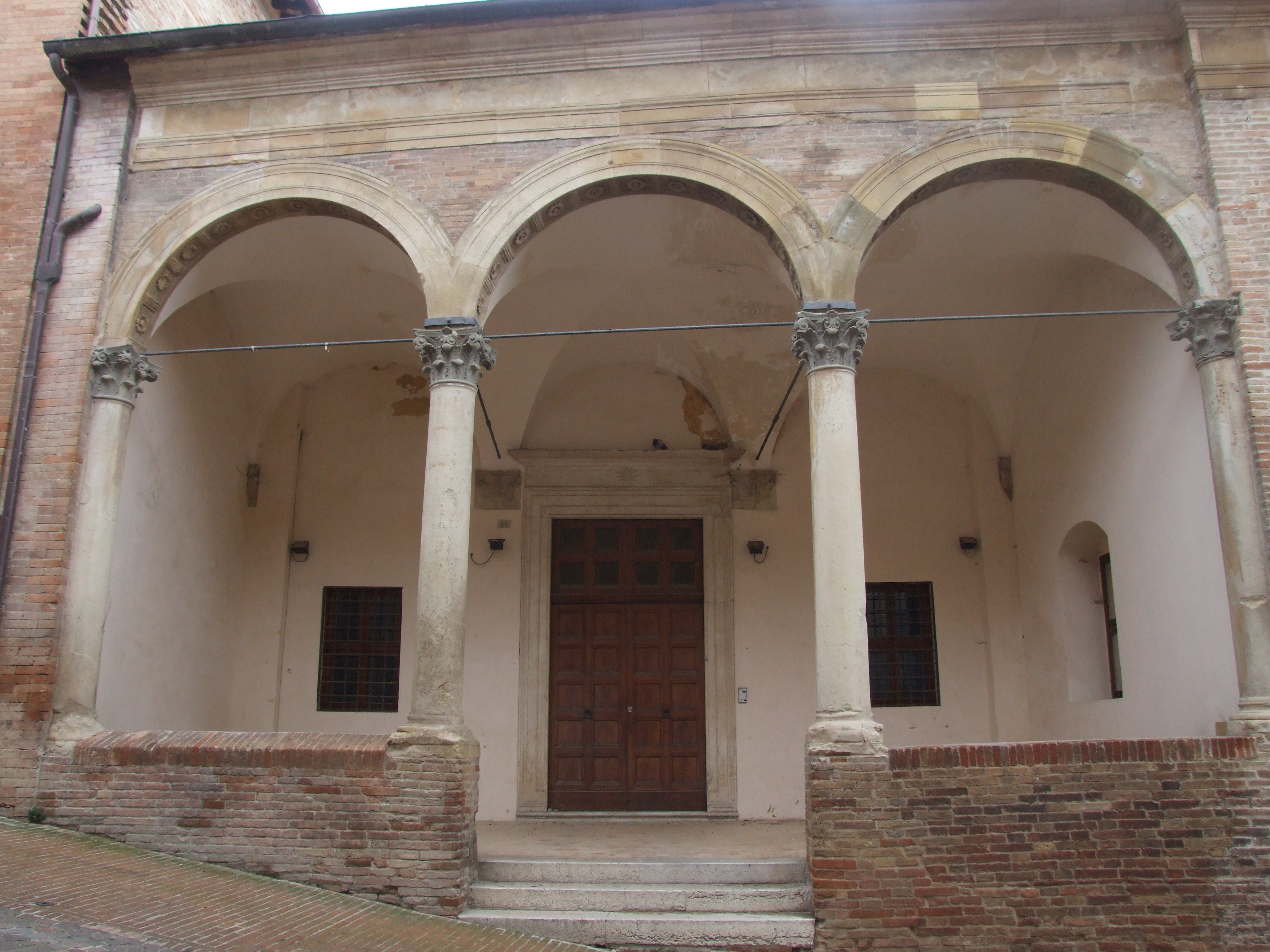 Tribunale This is a photo of a monument which is part of cultural heritage of Italy.